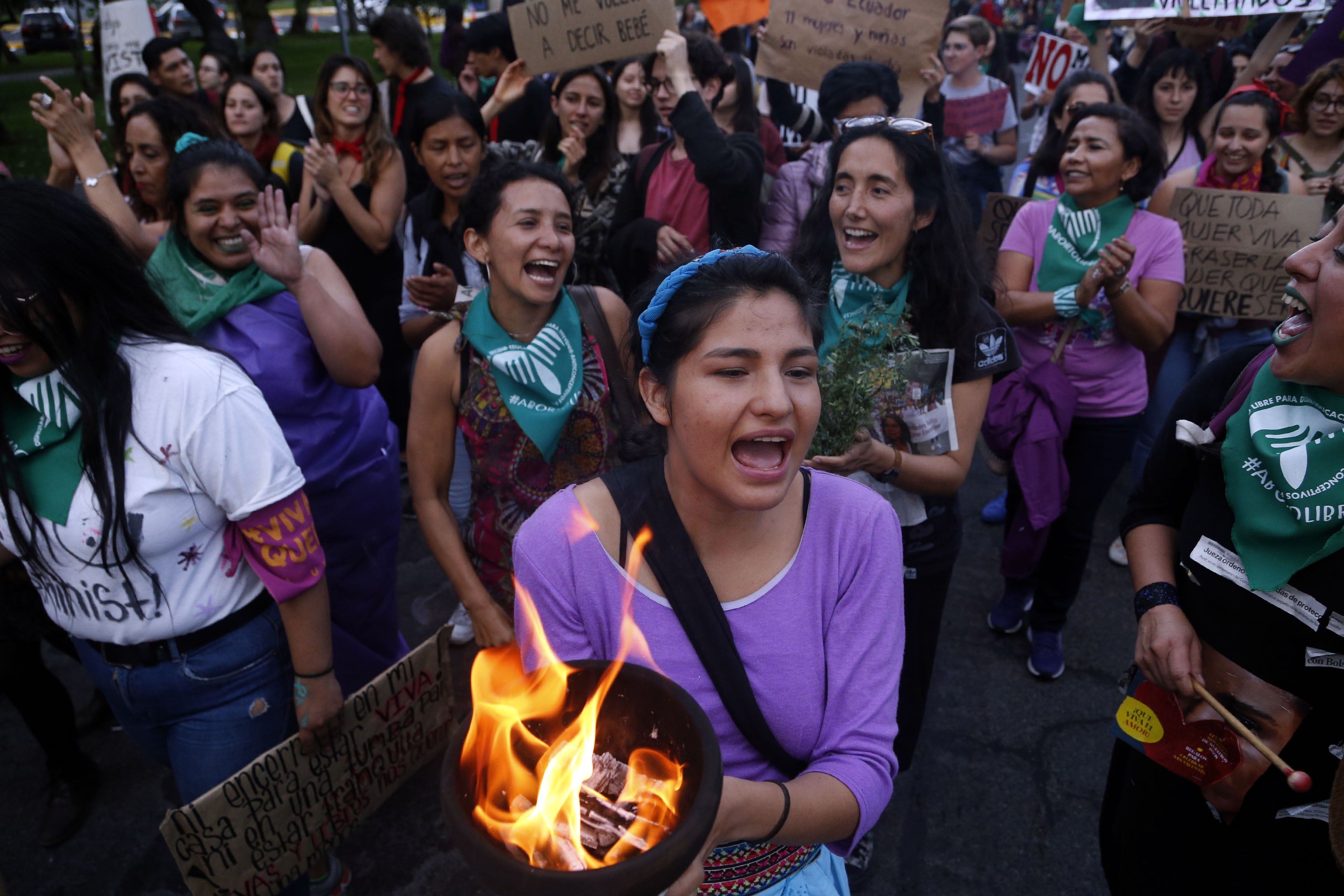 Mujeres en Quito - Ecuador marchan por la igualdad de género el 8M (8 de marzo del 2019).